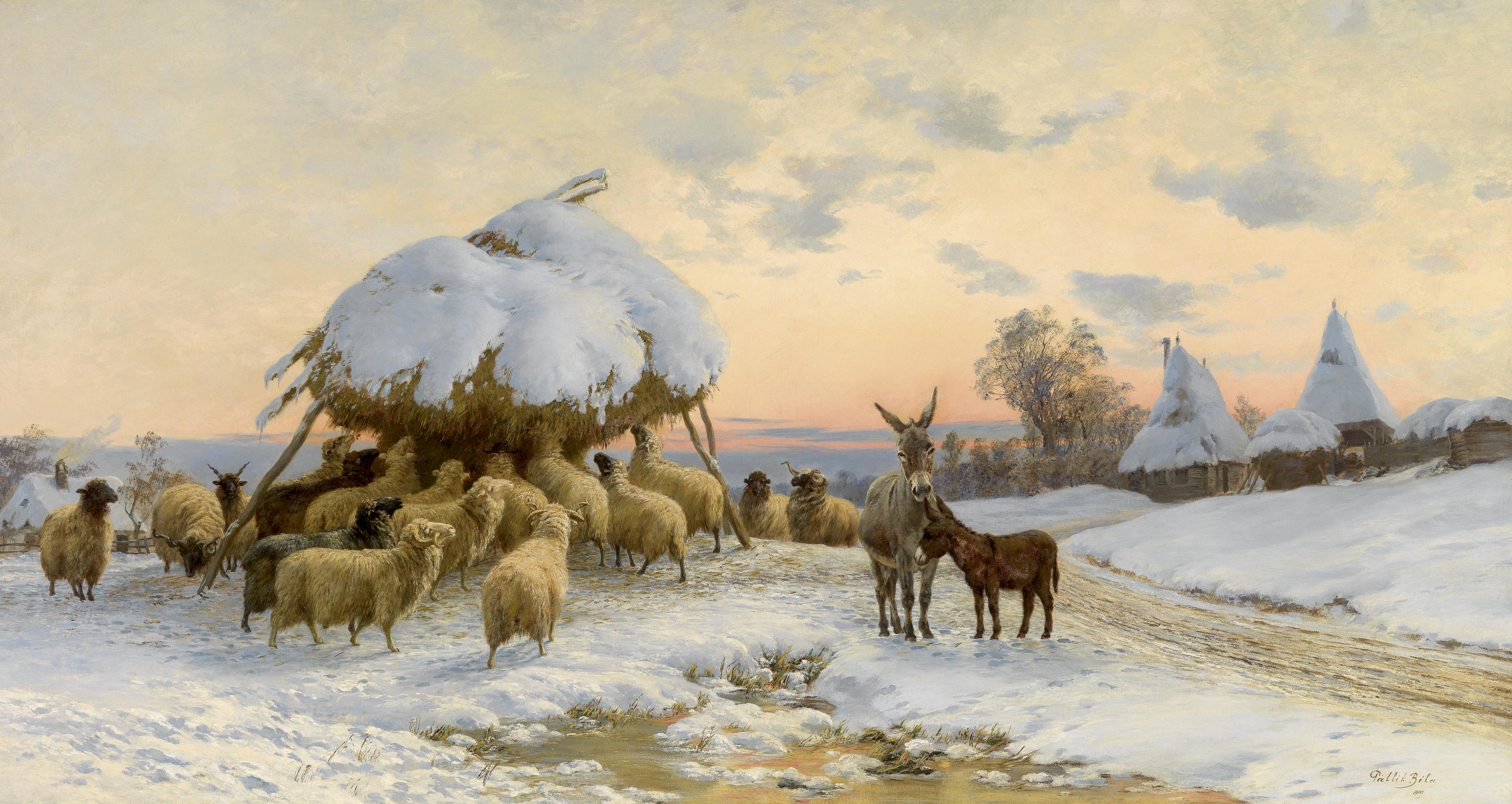 Winterzeit, signiert, datiert Pállik Béla 1901, Öl auf Leinwand, 65 x 121 cm